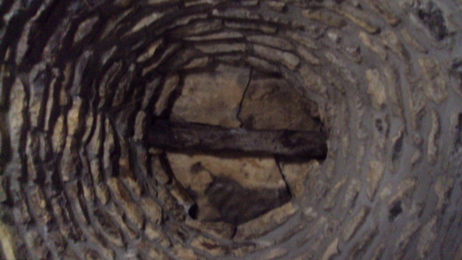 Techo de torreón circular visto desde el interior.